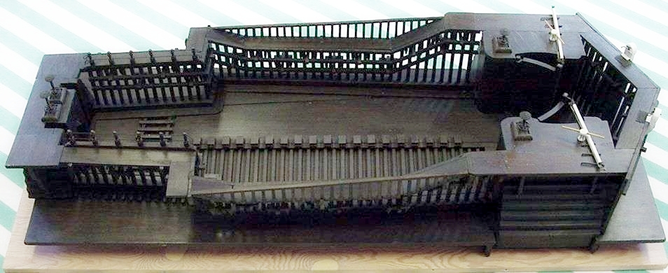 Constructiemodel van een droogdok. Het model laat de herstelwerkzaamheden uit 1756, waarbij de zijde van de Pottekade is afgedamt. De wanden zijn open, zodat de heifundering te zien is; de vloer is weggelaten, waardoor het onderliggende lattenwerk zichtbaar wordt. Eén eind is voorzien van rechte sluisdeuren, bediend met palen aan kaapstanders, en aan weerszijden een spui. Het andere eind is dicht en heeft ook twee spuien. De spuien worden bediend met hijsschroeven. Het dok verbreedt naar achteren en aan weerszijden leiden trappen naar beneden. Op het model zijn de toevoegingen van 1986 (kaapstaanders en de lieren van de spuisluiken in de deuren uit de 19e eeuw) in wit aangegeven